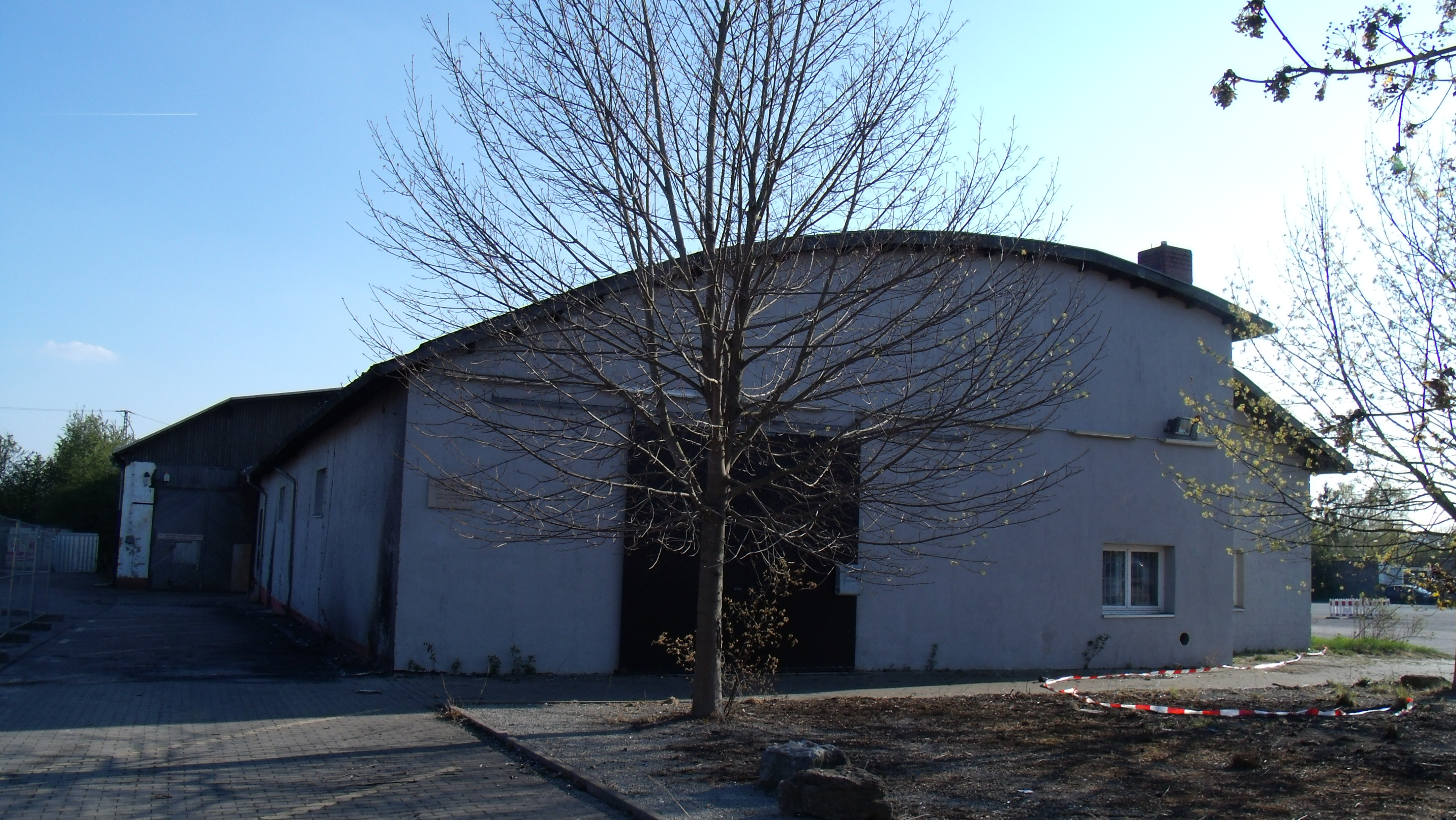 Eine kleine und eine sich direkt daran anschließende große Halle auf dem Gelände des Güterbahnhofs hinter der Marcel-Paul-Straße 57 in Weimar/Thüringen. An der Vorderseite ist eine Gedenktafel für Karl Friedrich Otto Hetzer (1846-1911), angebracht. Die Hetzerhallen in der Nähe der Hetzer-Villa um 1914/17 errichtet, gehören zum Fabrikgelände mit Bahnanschluß des ab 1901 unter dem Namen „Otto Hetzer Holzpflege- und Holzbearbeitung AG” firmierenden Unternehmens. Die Hallen gelten als Prototypen der sogenannten Hetzerhallen und stehen unter Denkmalschutz.